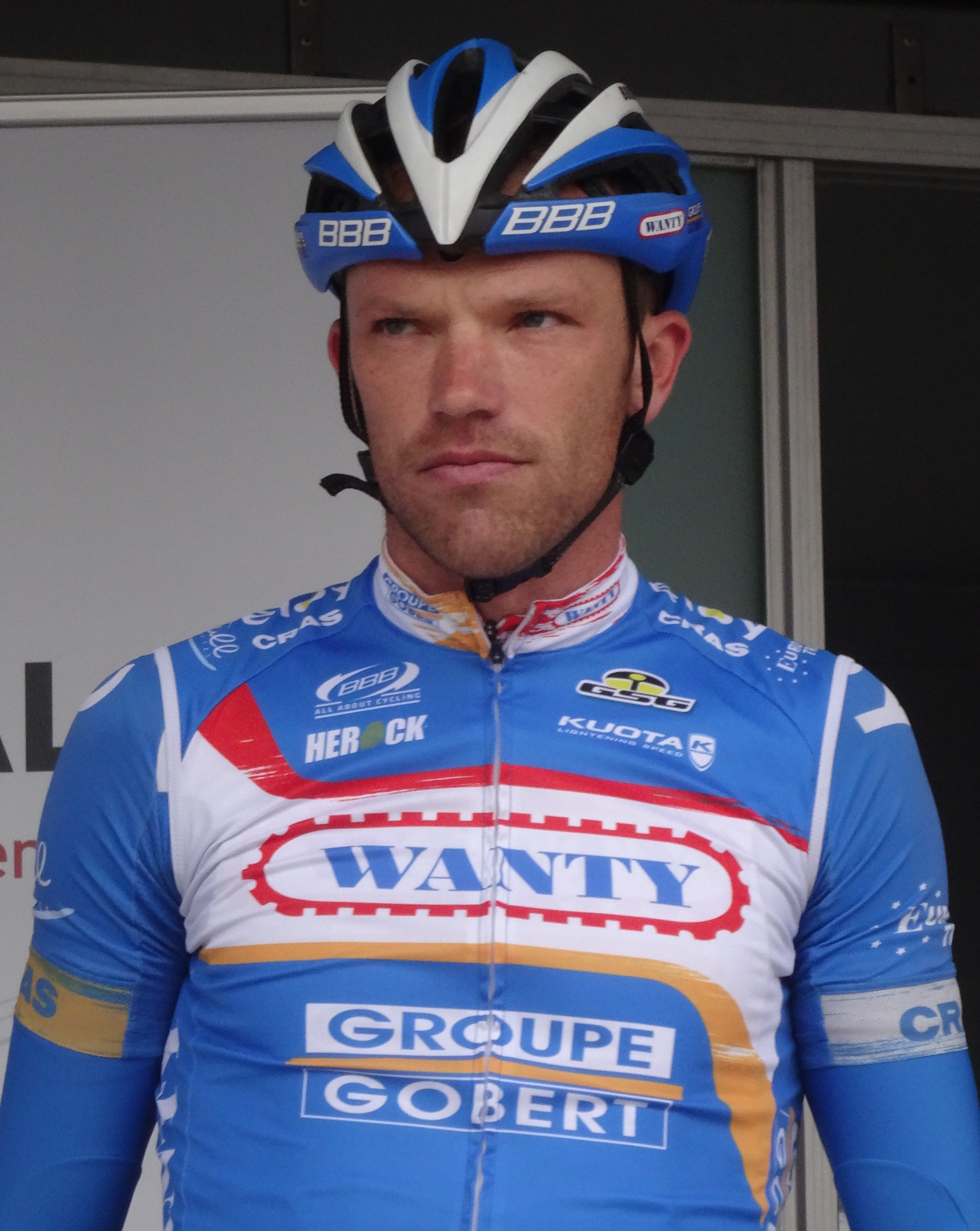 Reportage photographique réalisé le mercredi 24 septembre à l'occasion du départ et du début de la course du Circuit du Houtland 2014 à Lichtervelde, Belgique.